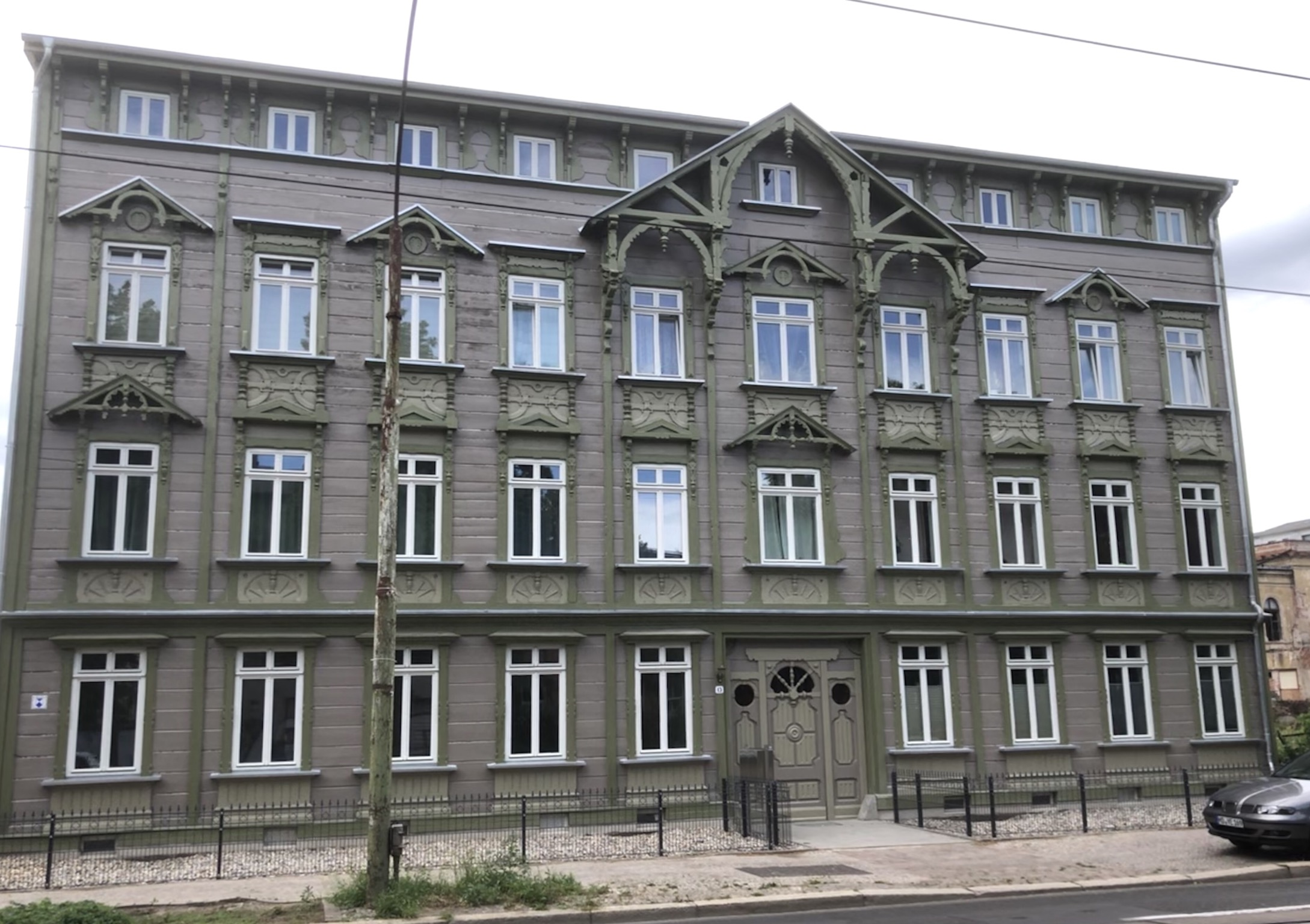 Leipziger Straße 13 nach der Sanierung, Magdeburg